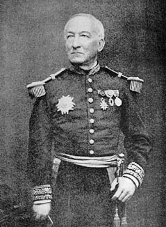 Retrat del matemàtic i almirall francès Ernest Fauque de Jonquières (1820-1901)